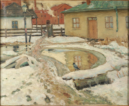 Головков Герасим Семенович Двор. (1898-1901, холст, масло, 73х92) в собрании ОХМ